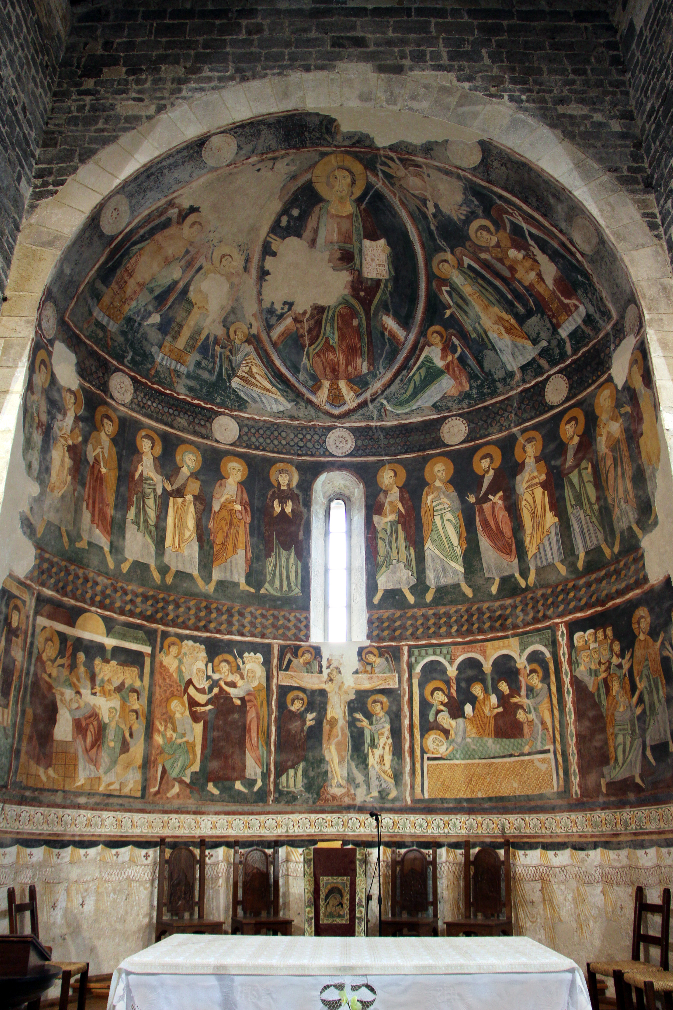 Codrongianos